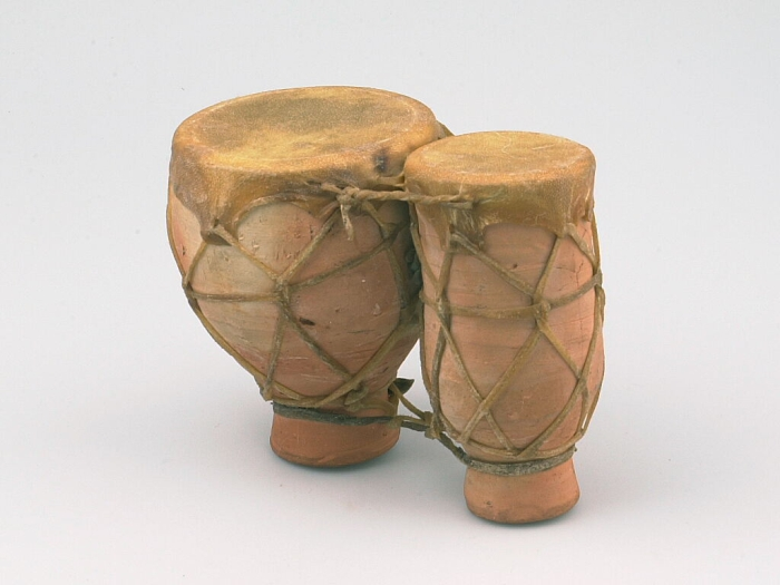 De vellen van deze dubbele keteltrom zijn op de tromlichamen van aardewerk bevestigd door middel van leren spankoorden in netvorm, die aan het vel geregen zijn. De trommen zijn aan elkaar bevestigd met leren koorden.